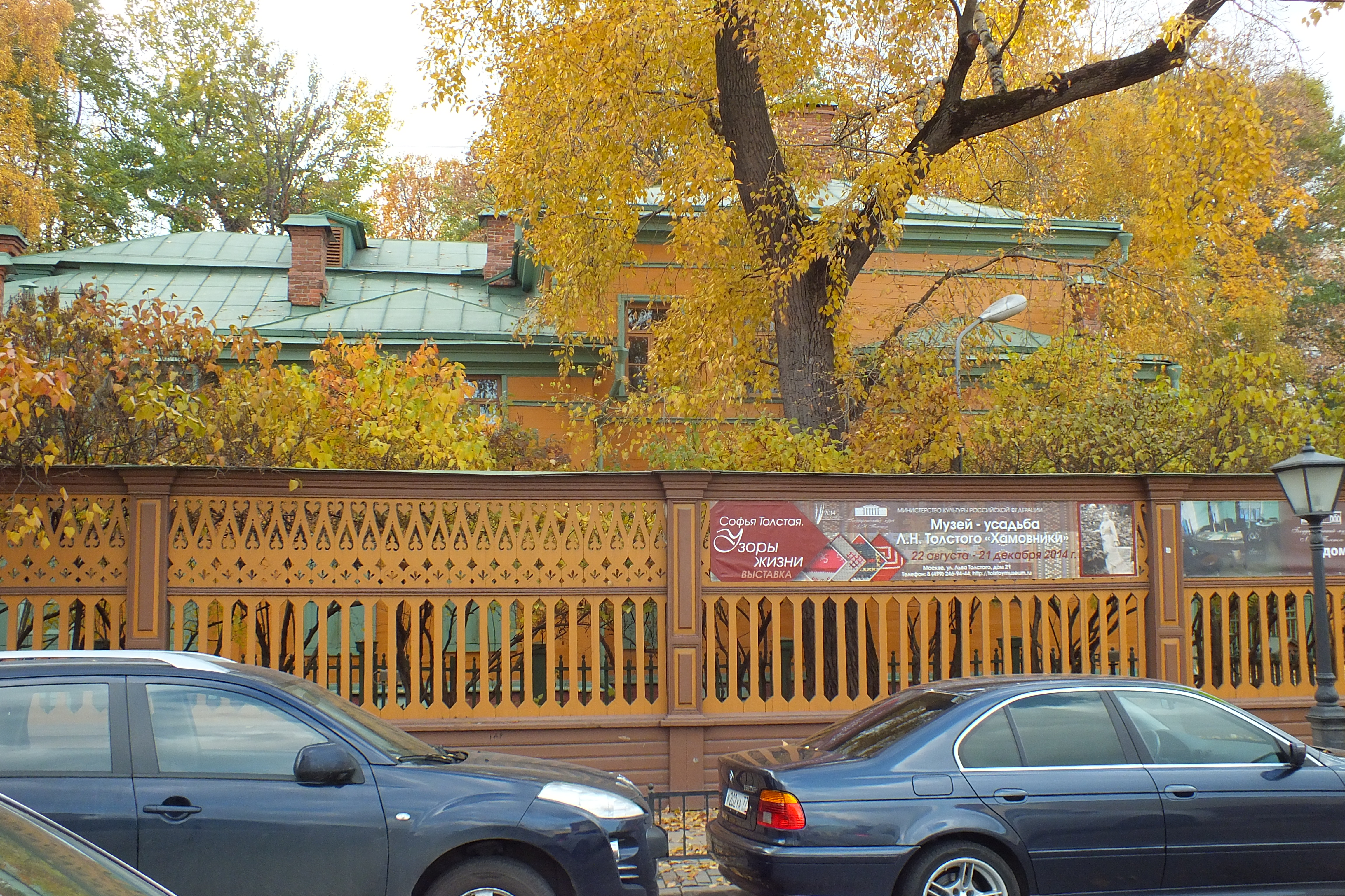 Музей-усадьба Л. Н. Толстого «Хамовники» (Москва, улица Льва Толстого, 21)